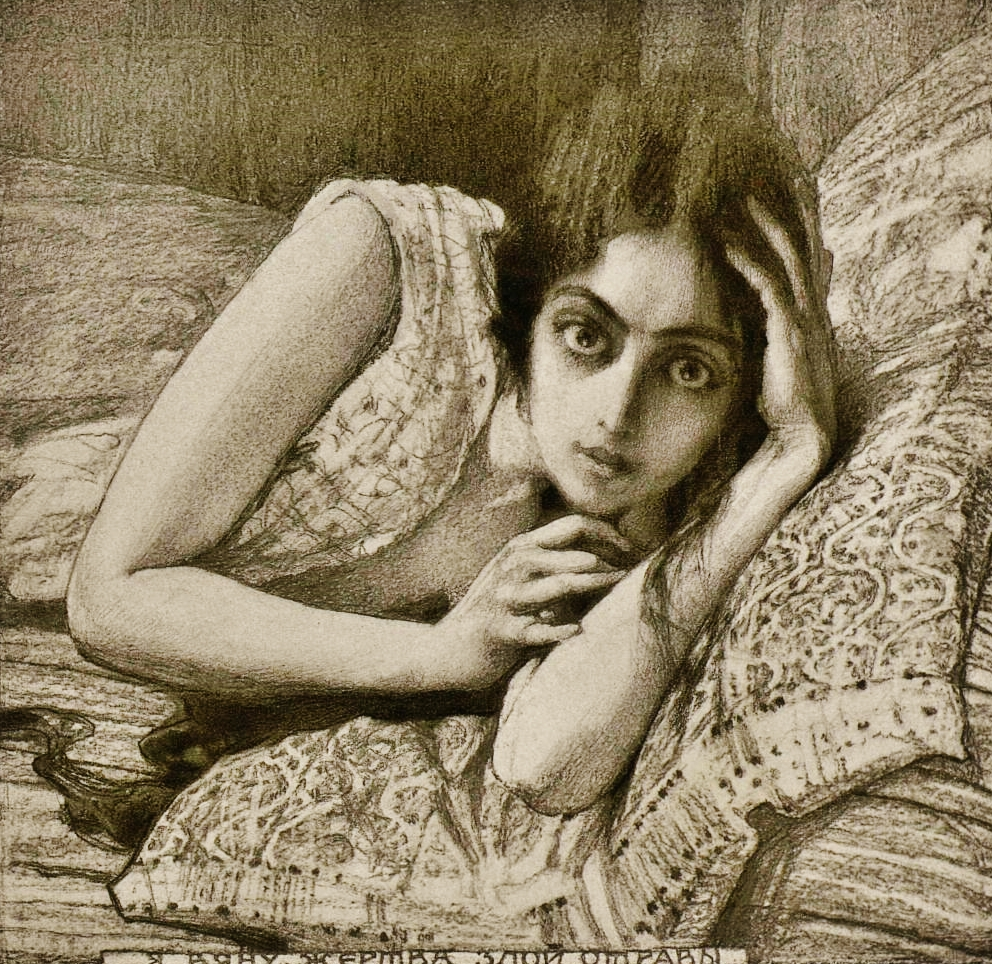 Illustrazione di Al'fred Ėberling della Tamara lermontoviana